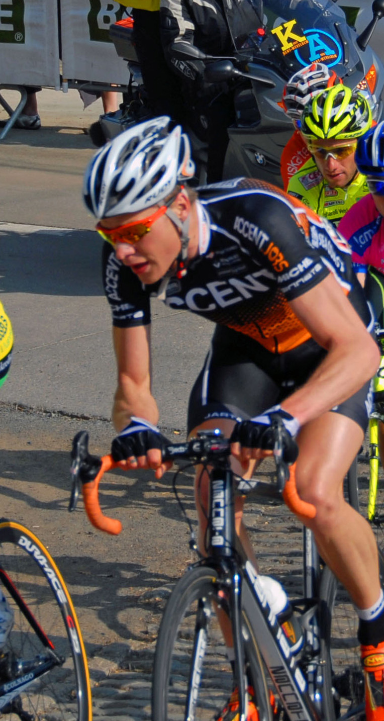 beklimming van de Kemmelberg tijdens Gent-Wevelgem 2012